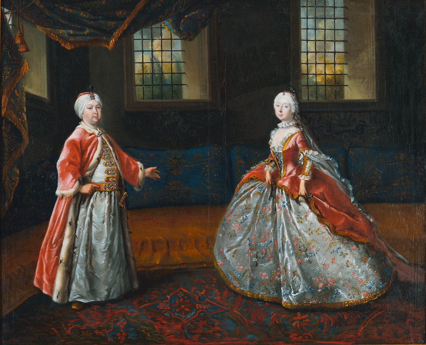 Theaterszene Friedrich III und Luise Dorothea van Sachsen-Gotha-Altenburg